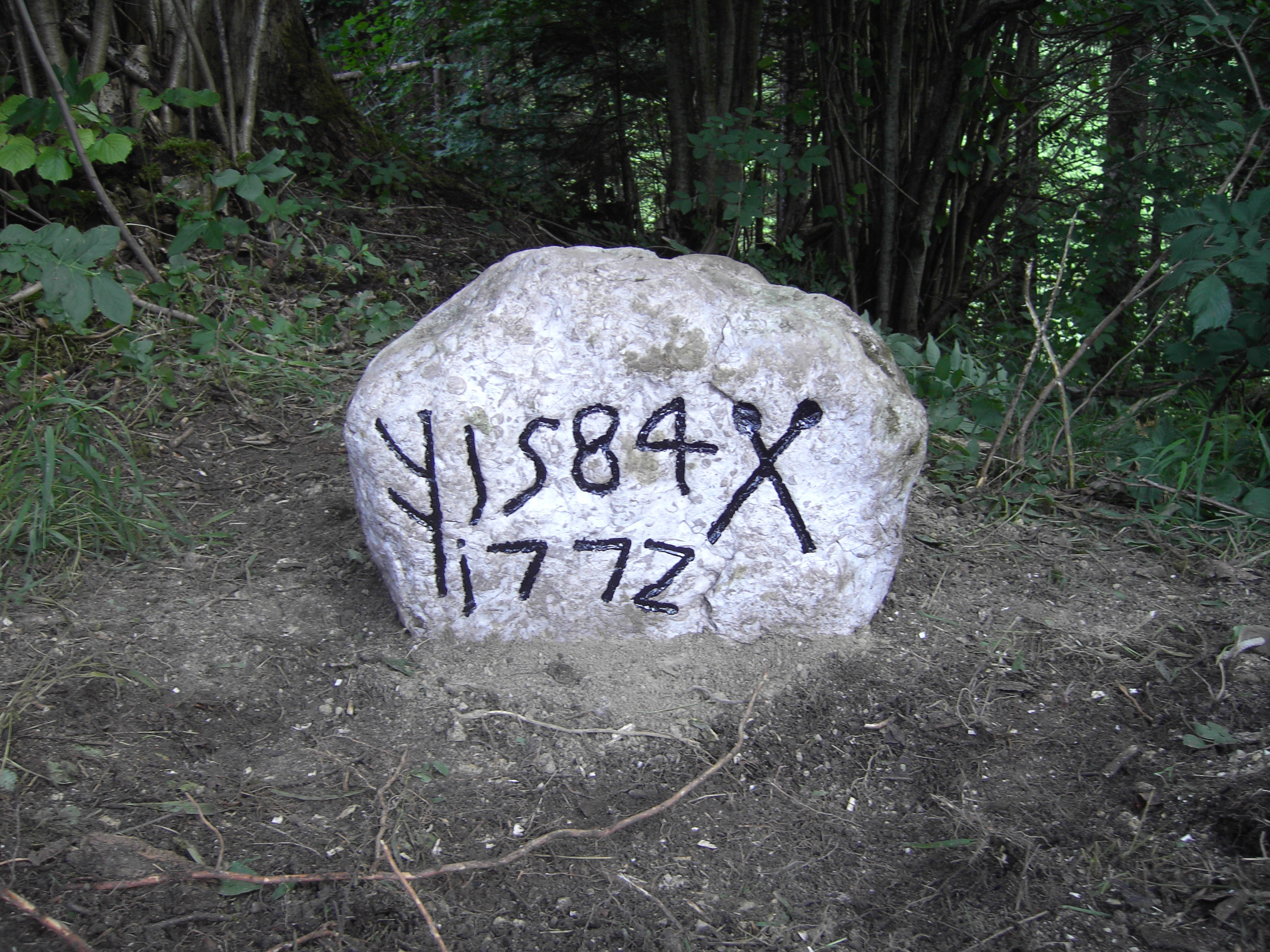 Grenzstein von 1584 an der Staatsstraße 2072 beim Ortsteil Fleckhaus in Jachenau